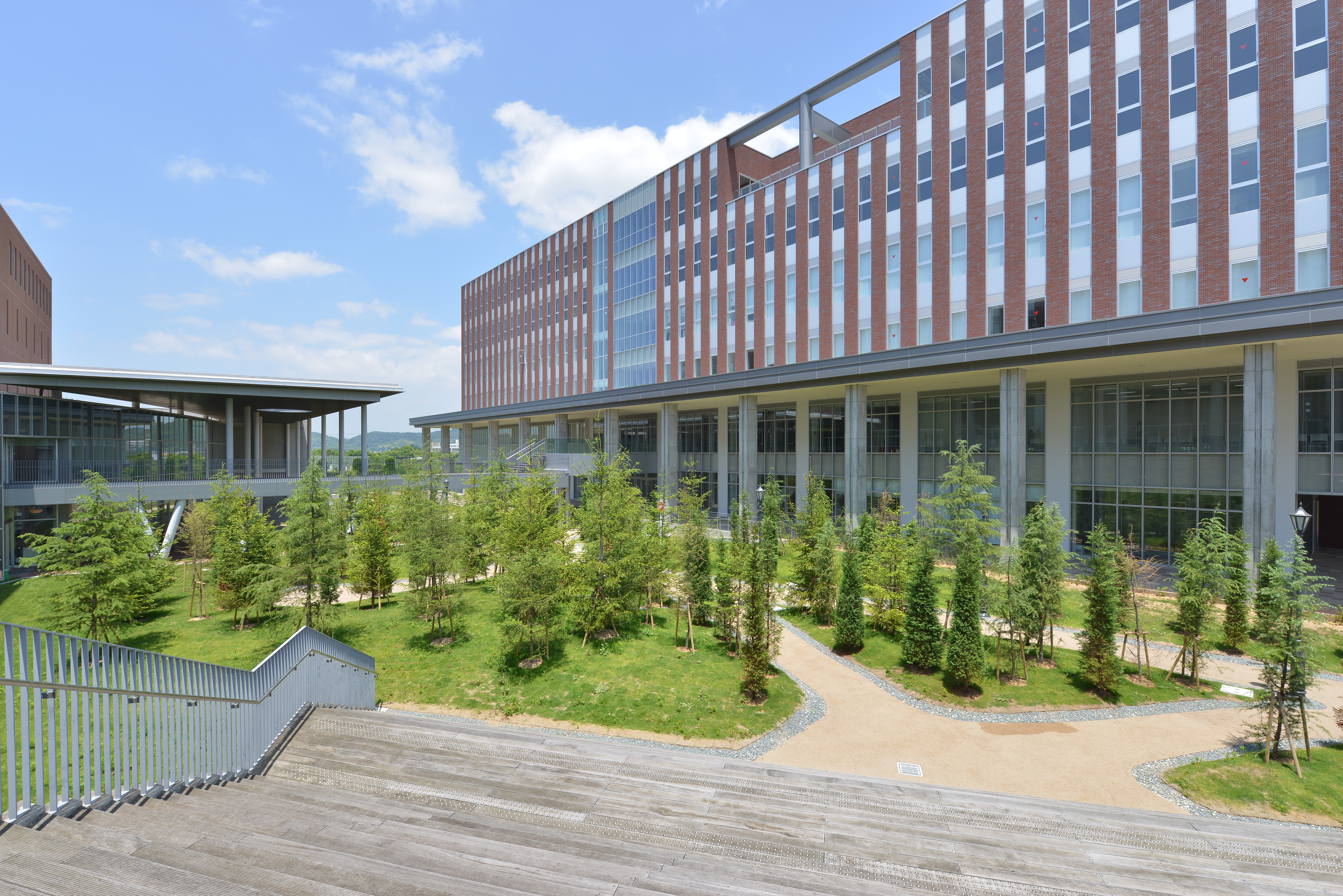 姫路大学内の中庭風景